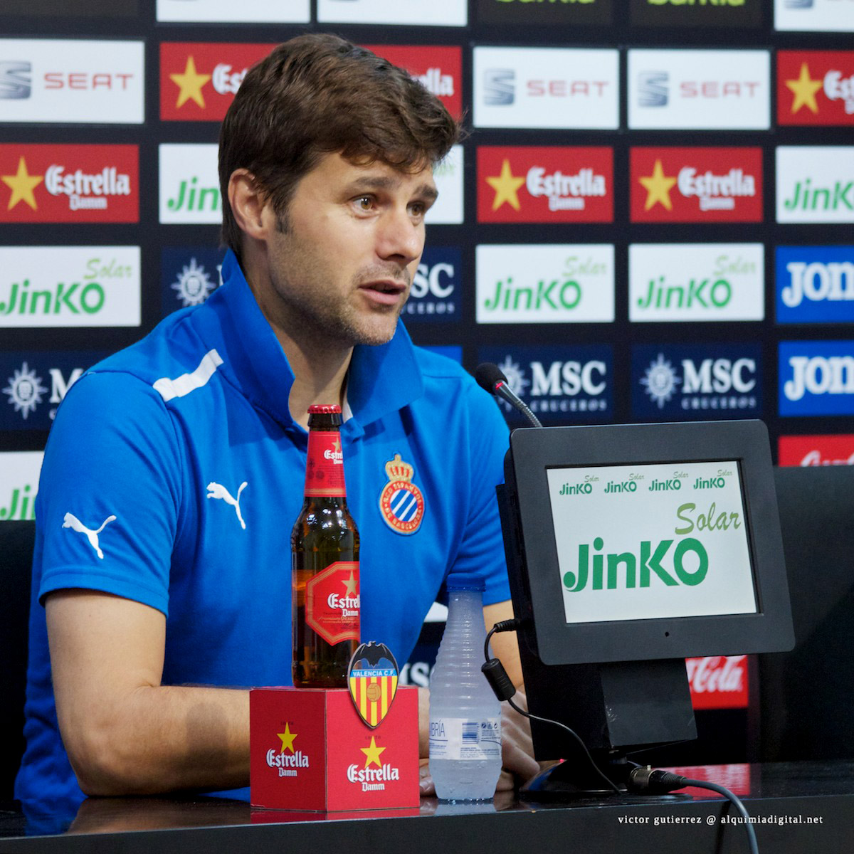 Valencia CF - Español 2012 #42